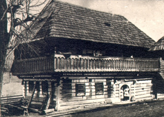 Pôvodná drevená budova, ktorá bola rozobratá, a odvezená na národopisnú výstavu do Prahy. Žiaľ pri požiari zhorela, Čičmany, Slovensko.